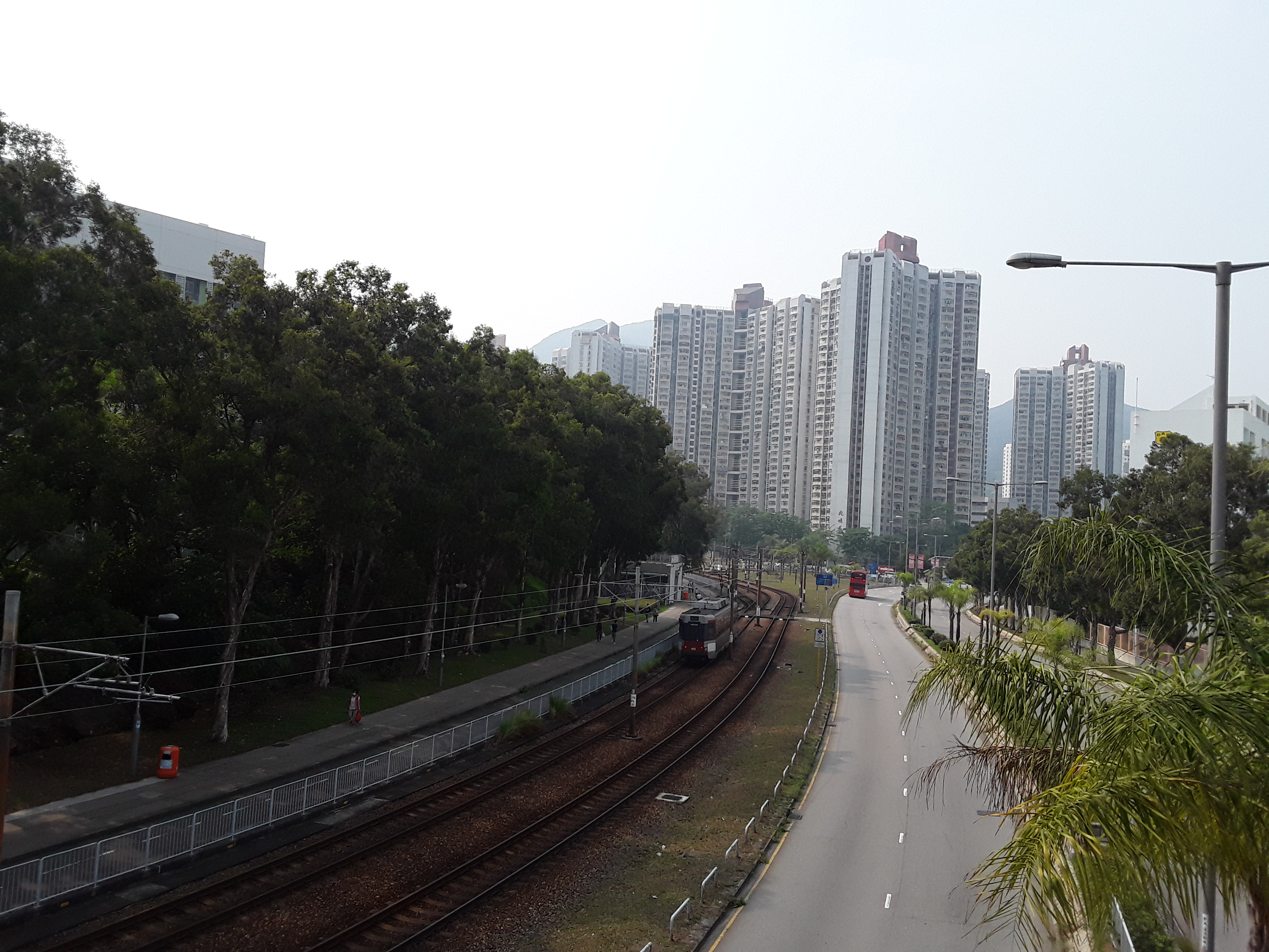 中文（香港）: 田景邨部分樓宇與兆畦苑 攝於石排輕鐵站